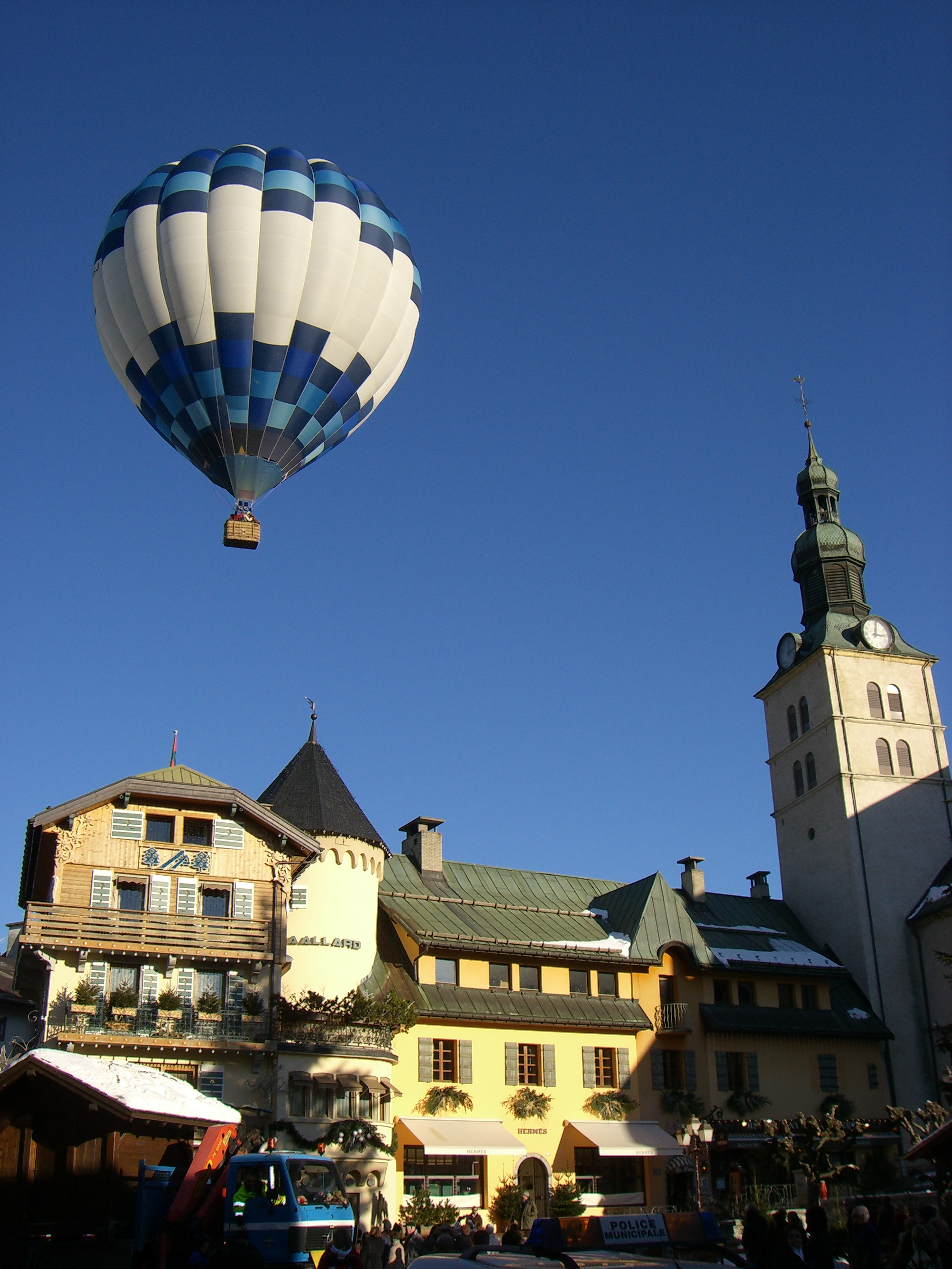 Coeur du centre ville de Megève durant la saison d'hiver en Décembre 2006